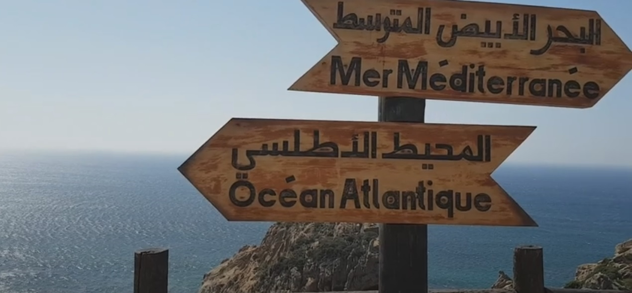 cap spartel